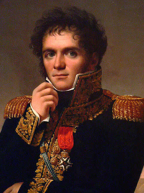 Ritratto di Jean-Louis Reynier